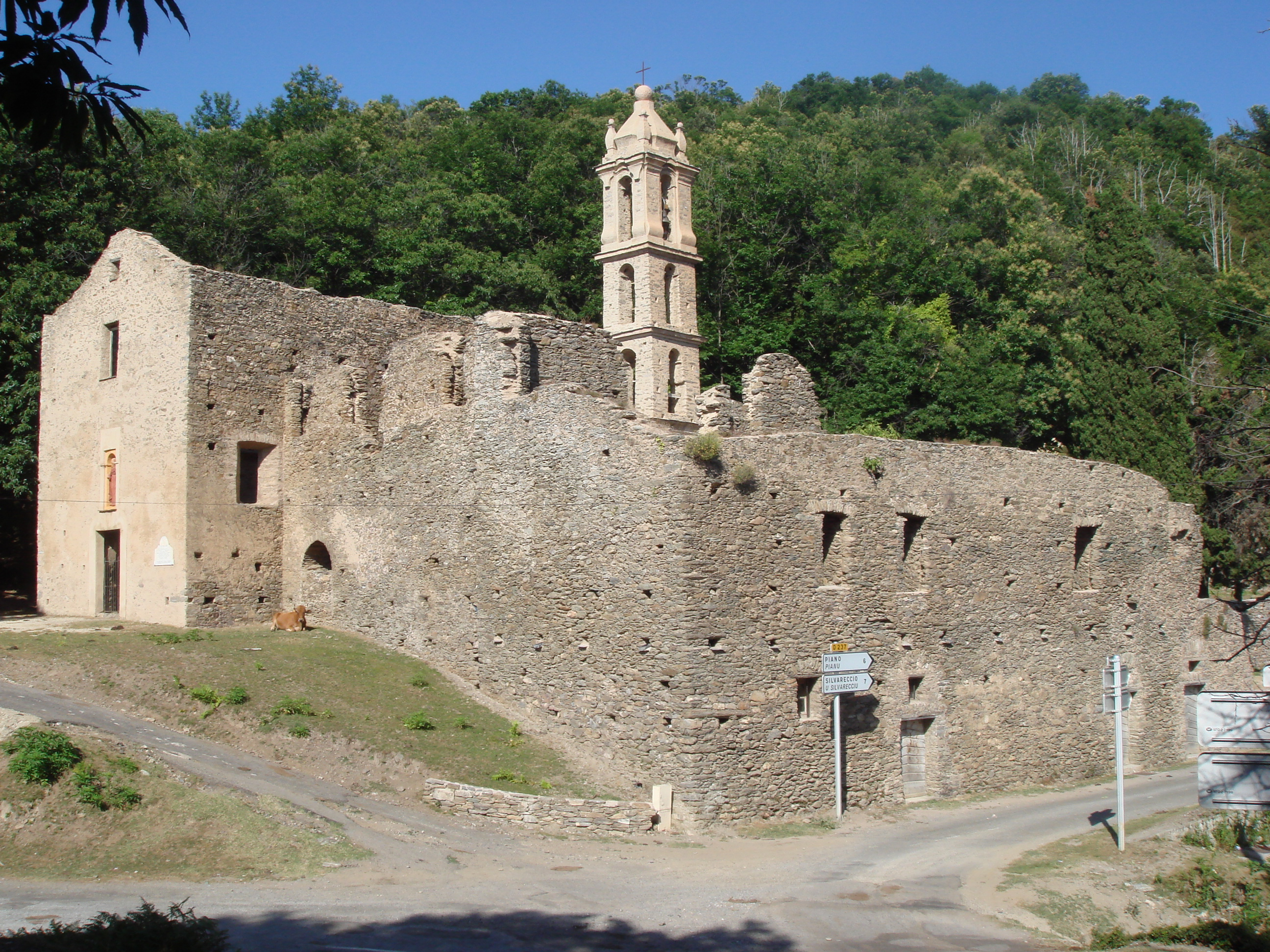 couvent Saint Antoine de Casabianca, Castagniccia, Corse